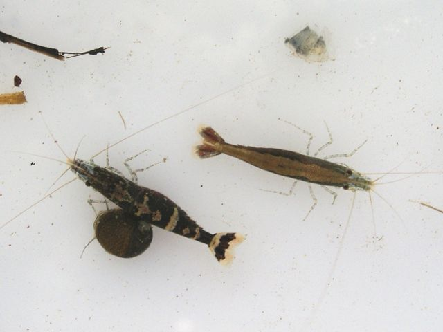 ヒメヌマエビ, 長崎市 (Caridina serratirostris, Nagasaki, Nagasaki)